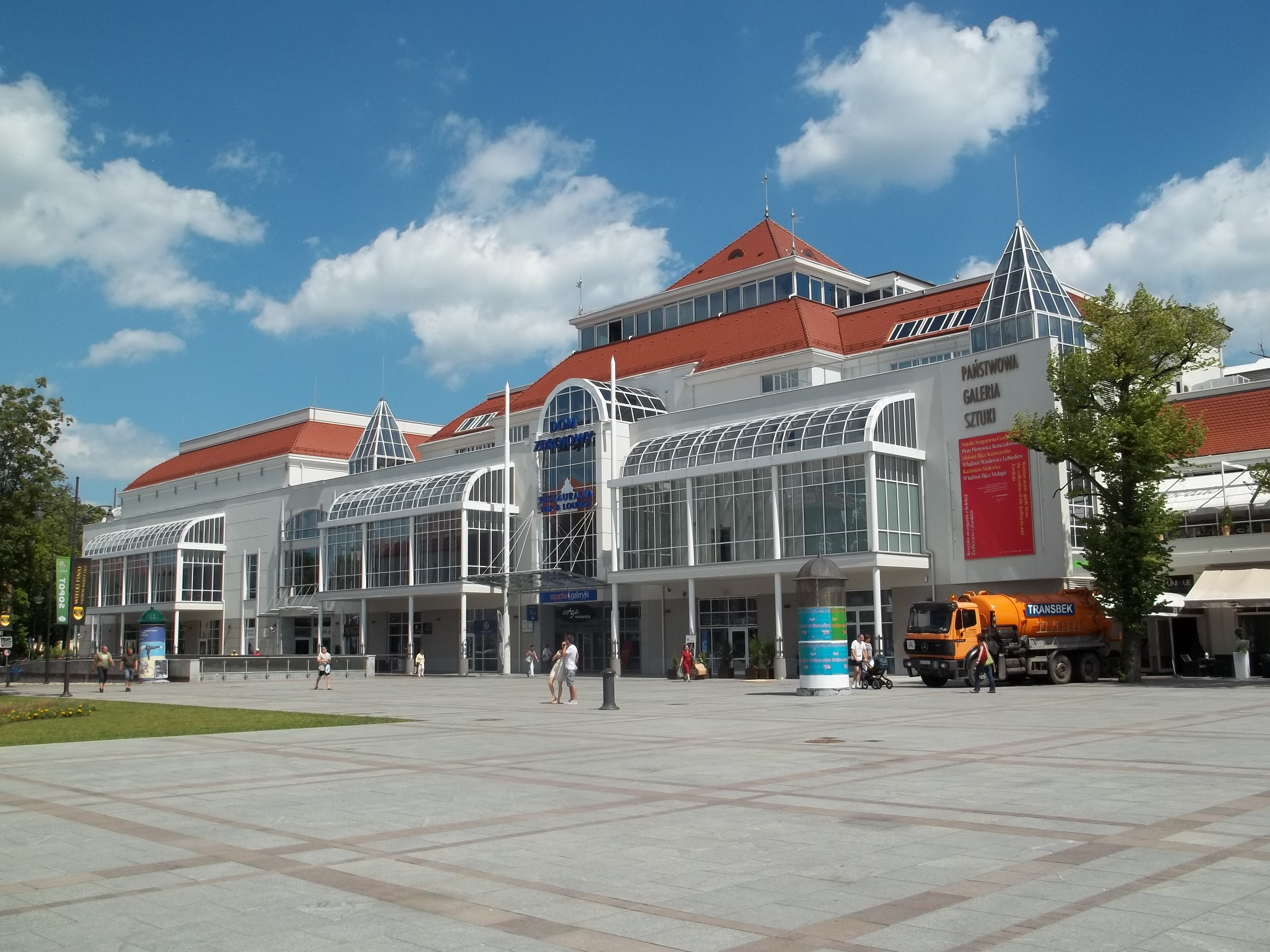 Państwowa Galeria Sztuki w Sopocie (Dom Zdrojowy) i pl. Przyjaciół Sopotu.